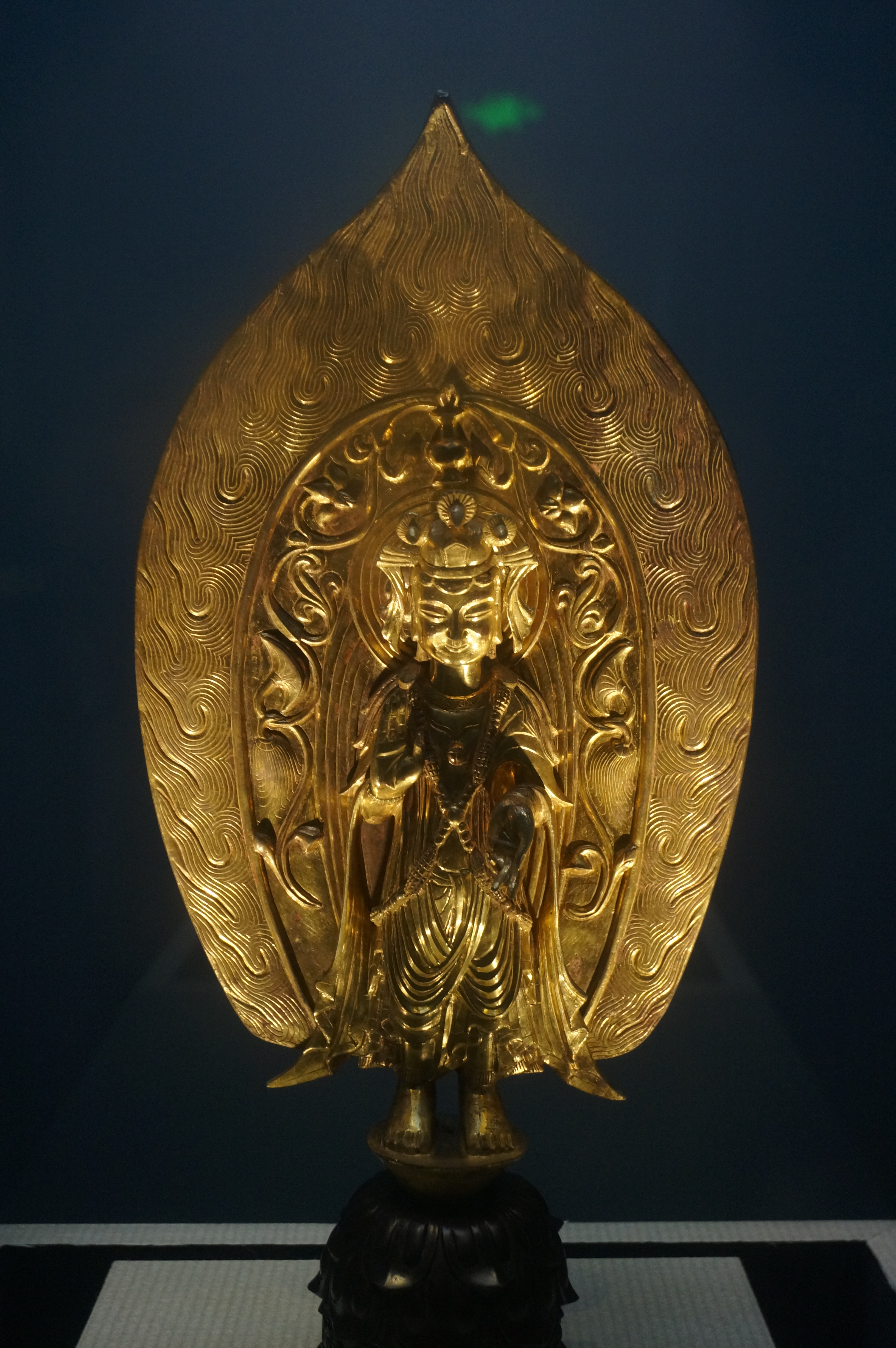 南朝鎏金铜大势至菩萨立像，金华万佛塔地宫出土，浙江省博物馆藏。